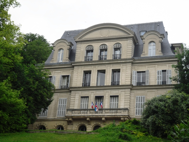 Hôtel de Ville de Juvisy-sur-Orge (91)